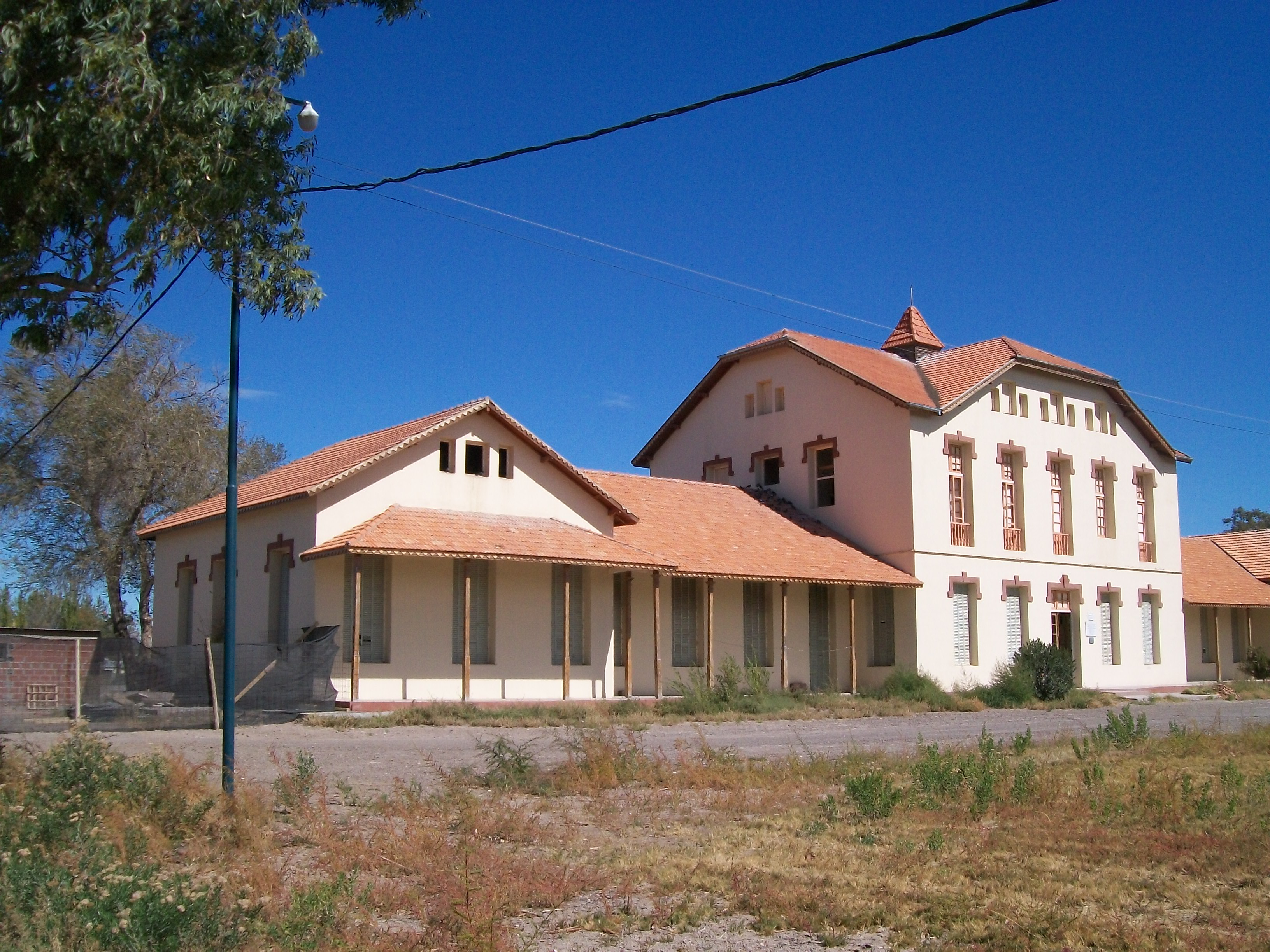 Antiguo edificio de la dirección del Hospital de Allen. Calle San Martín entre calles M. M. de Güemes y Jonas Salk. Localidad de Allen. Provincia de Río Negro. Argentina. "Este edificio fue inaugurado el 25/2/1925. Fue recuperado y restaurado el 25/5/2008 como patrimonio histórico de nuestra Patagonia por la asociación civil Memoria Urbana...“ (El texto entre comillas es un fragmento de la placa colocada cerca de la entrada principal.)